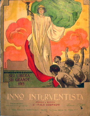 copertina dello spartito dell'Inno interventista di Italo Compagni nella prima edizione di Giaretta & C., Milano 1915